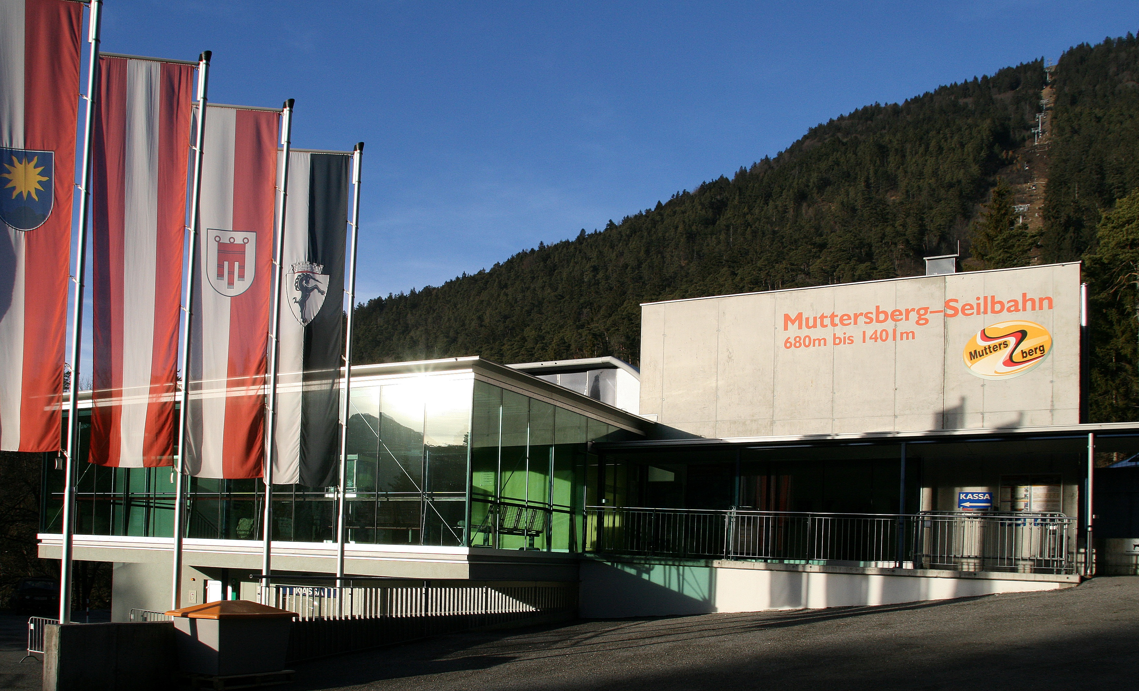 die Muttersbergbahn Talstation in Bludenz, Vorarlberg.